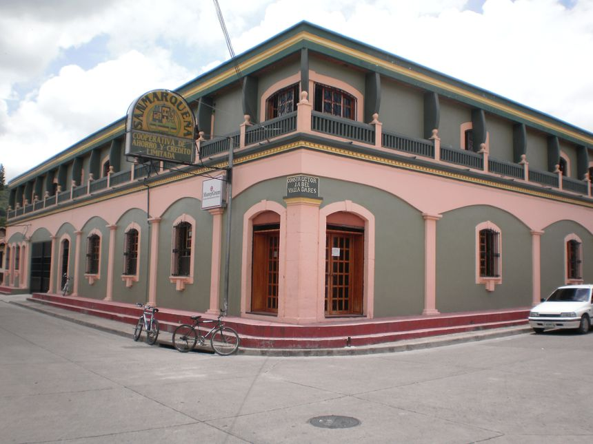 Édifice du siège social de la Coopérative Sanmarqueña, dans la ville de San Marcos de Colón